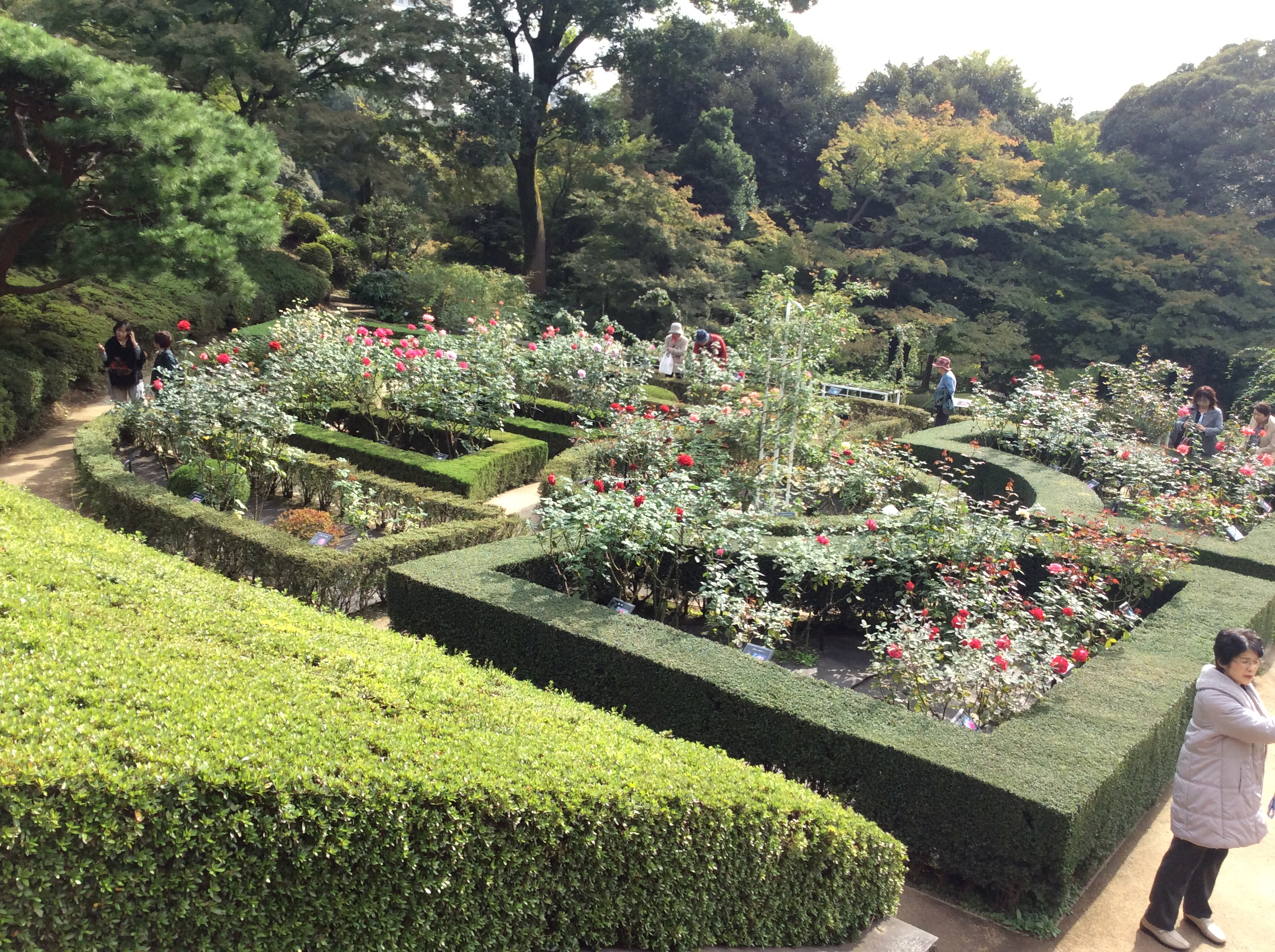 テラス第2段。バラ園。幾何学的な構成になっている。